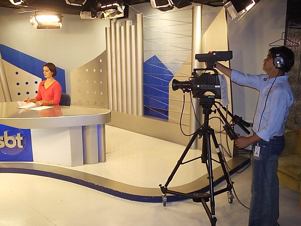 Jacqueline Bogdezevicius, jornalista - âncora do telejornal Cidade Viva - SBT